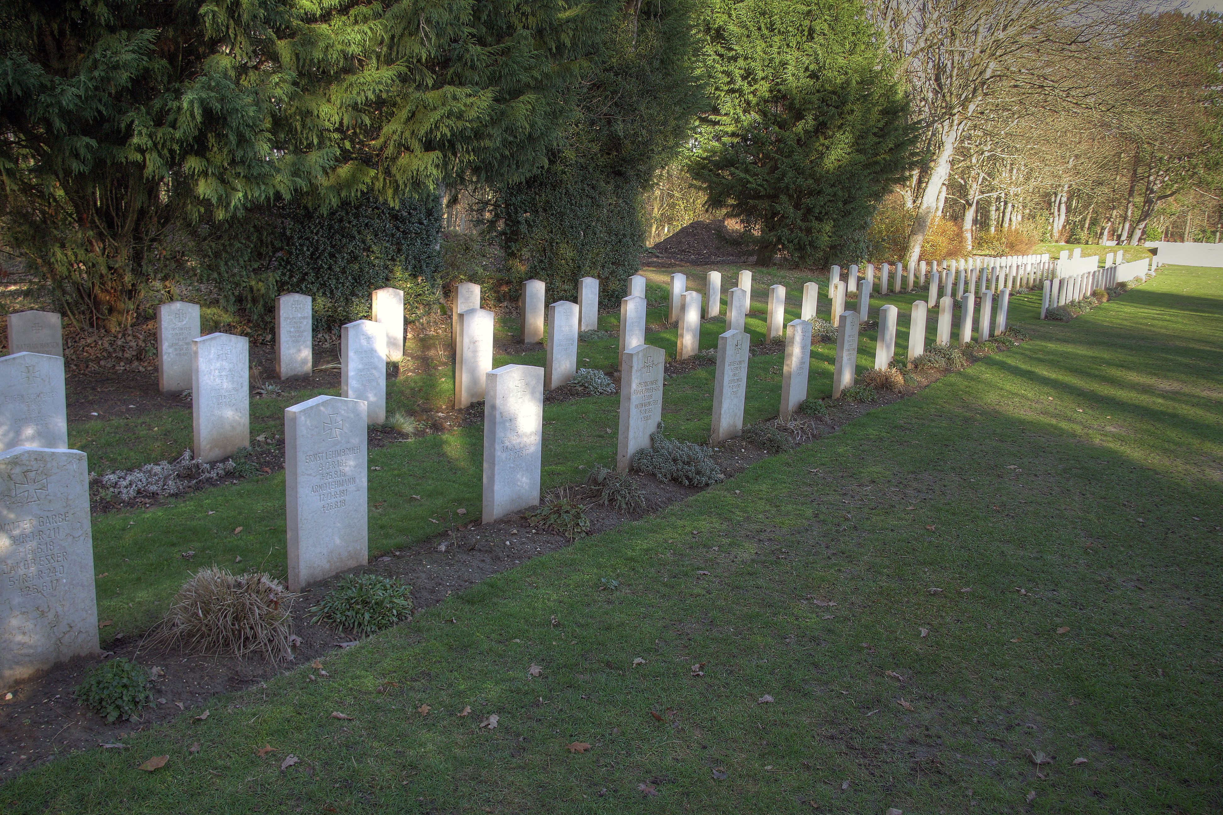 Les tombes Allemandes au cimetière d'Etaples